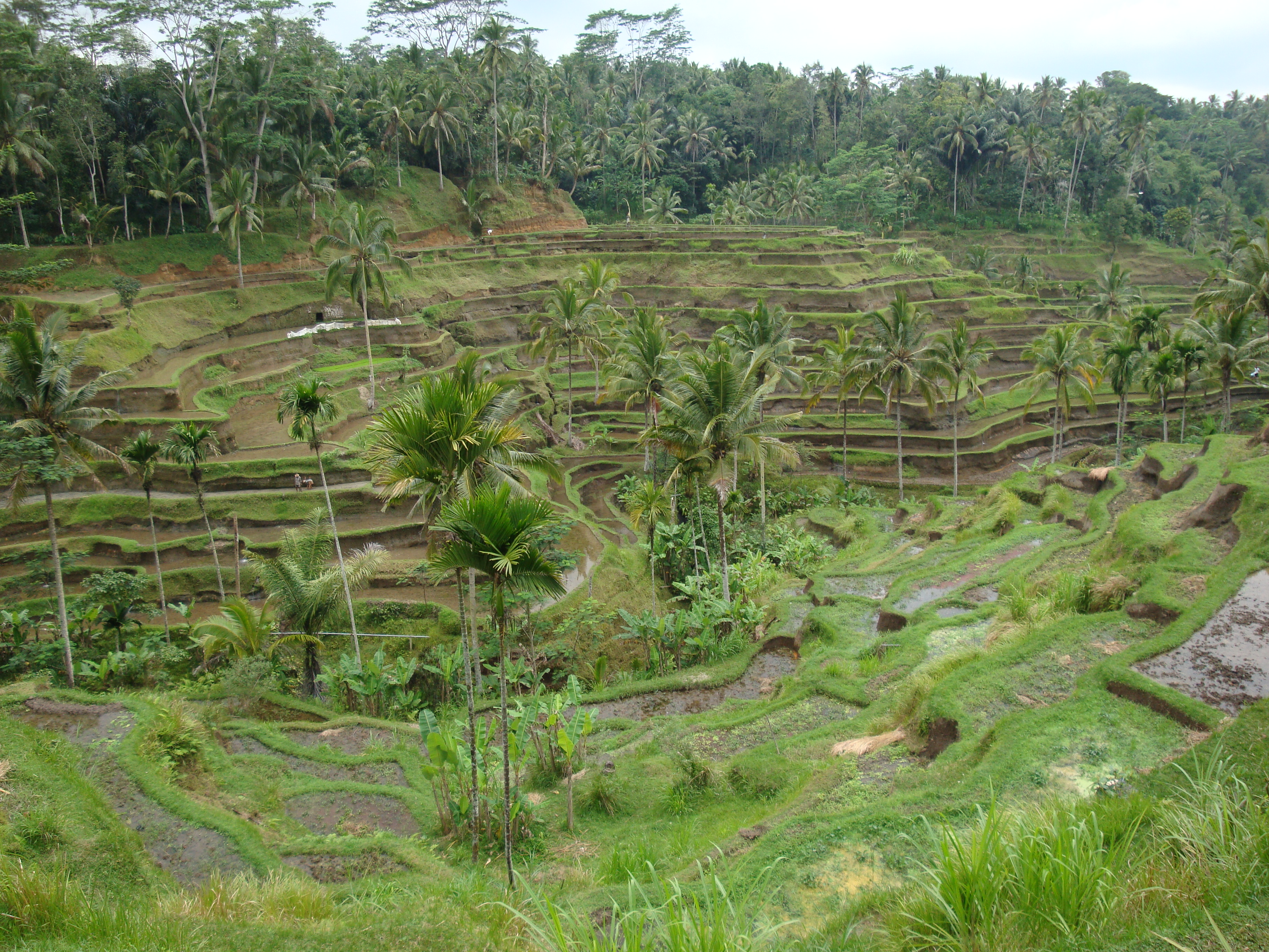 Рисовые чеки. Сделана в Бали в 2009 году.